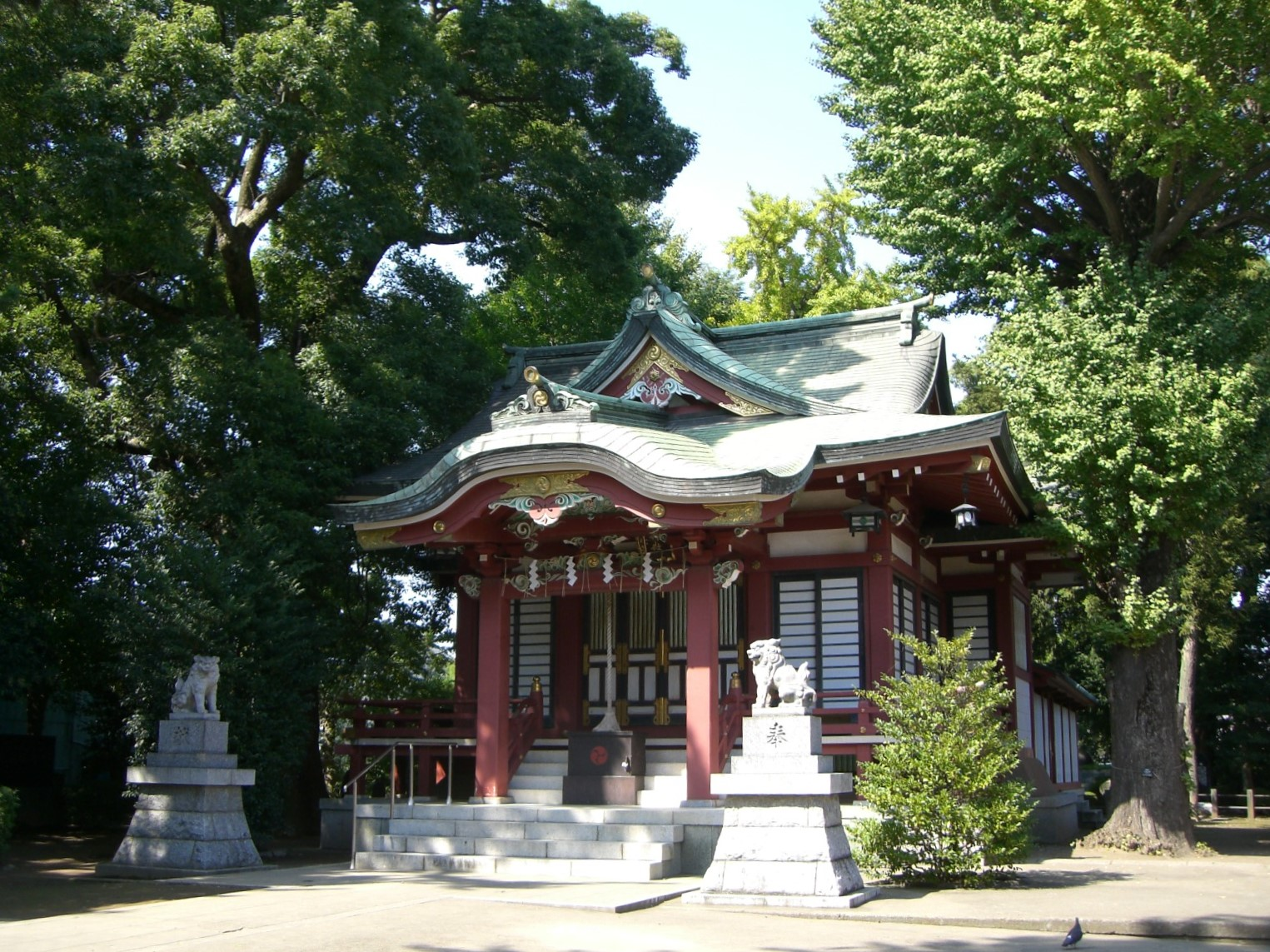 柴又八幡神社の社殿